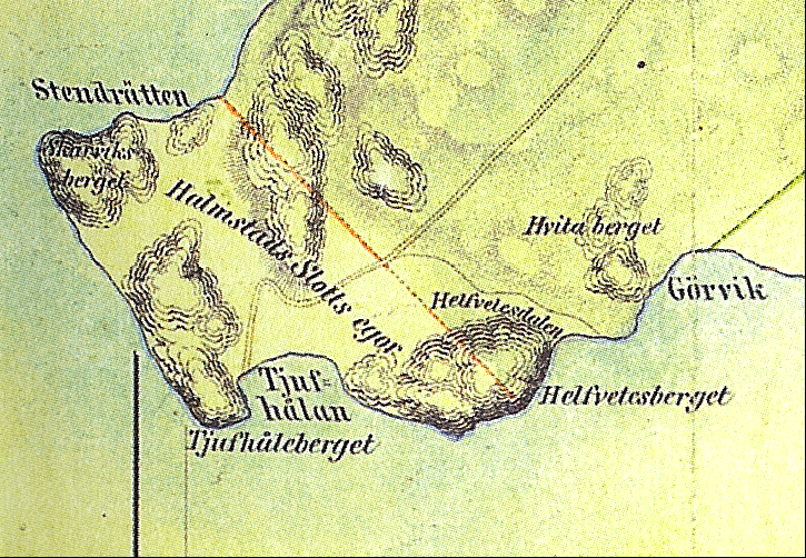 Gustaf Liunggrens karta överTjuvahålan från år 1855.